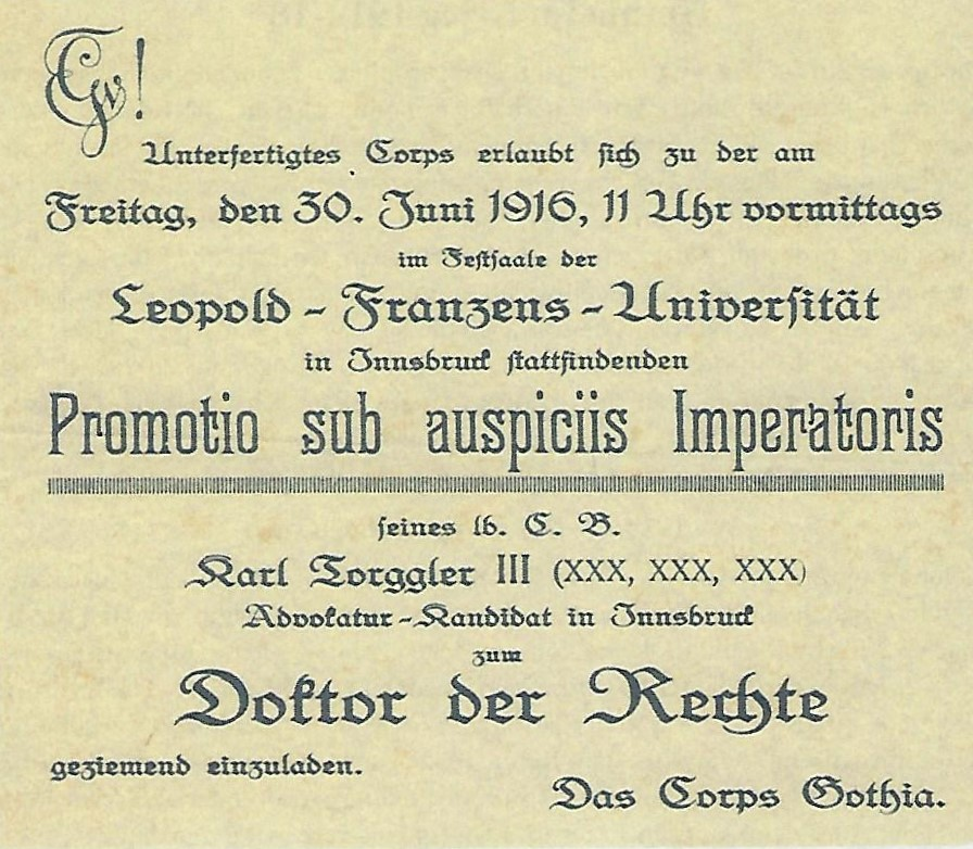 Einladung des Corps Gothia zur „Promotio sub auspiciis Imperatoris“ von Karl Torggler